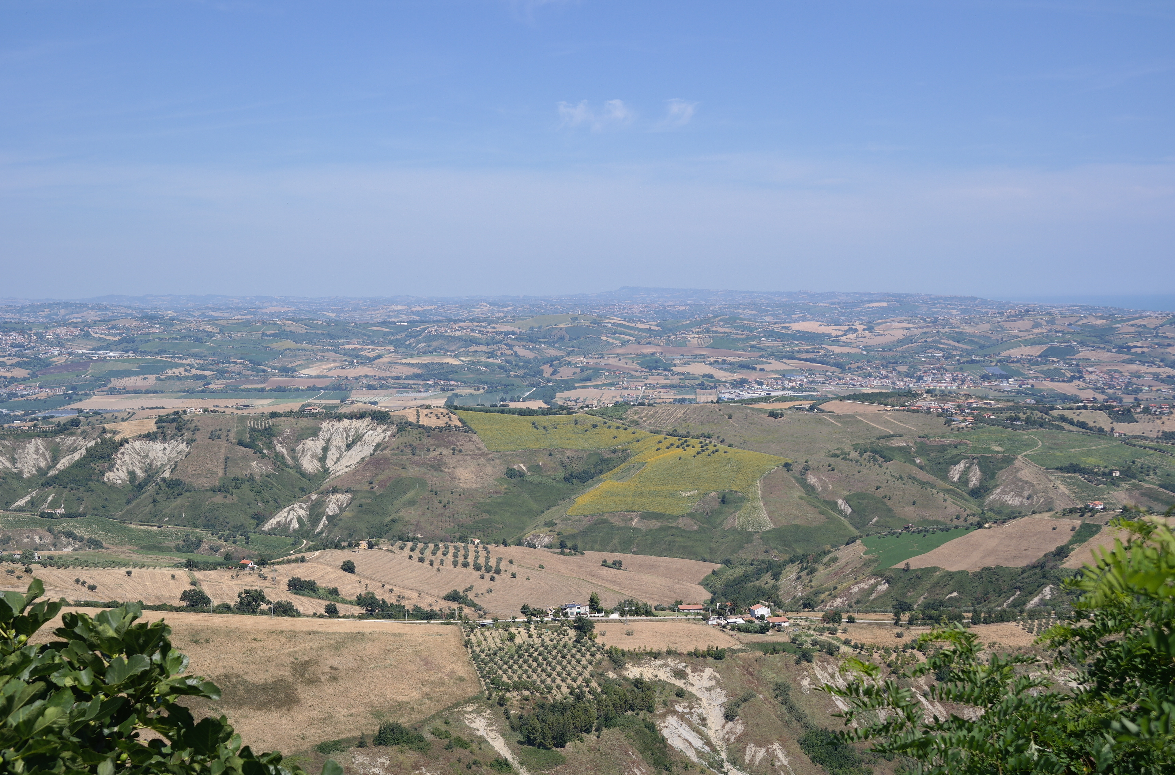 Panorama dell'entroterra della Provincia di Teramo da Atri